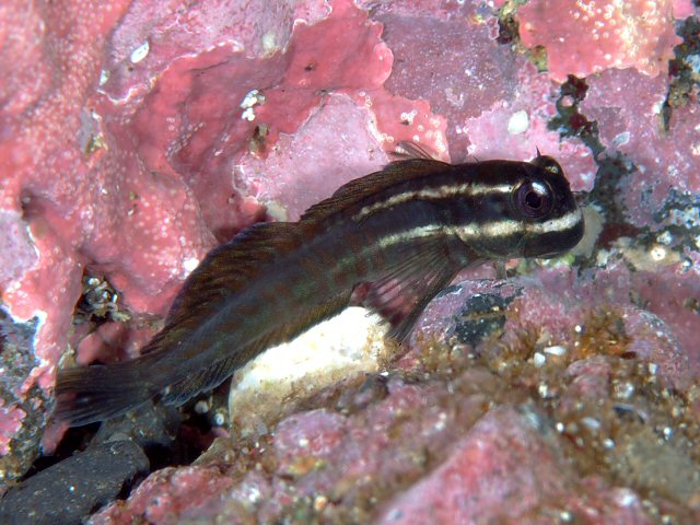 カエルウオ Istiblennius enosimae